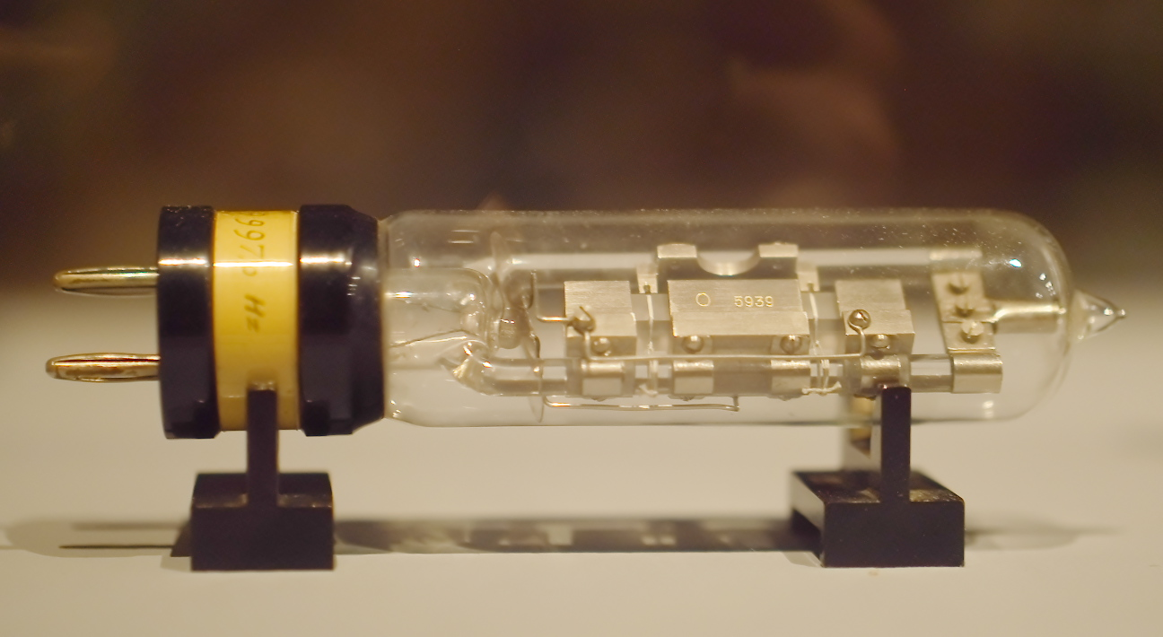 Steuerquarz einer Quarzuhr, 1936, Quarz aus Brasilien, Schliff in Berlin, Herstellung GeoForschungsZentrum Potsdam, Exponat der Ausstellung 2017 vom GeoForschungsZentrum Potsdam